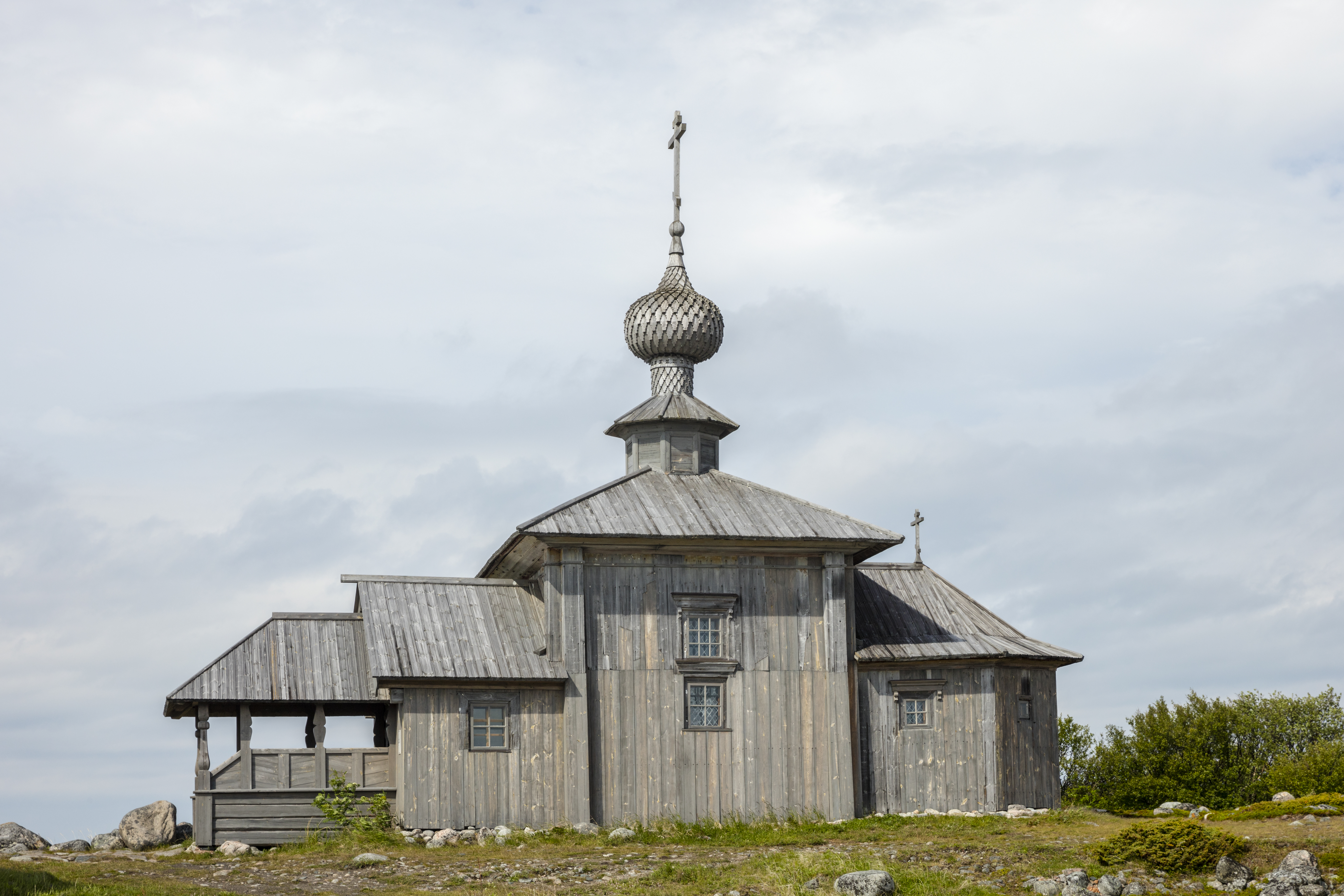 Церковь Андрея Первозванного: Центр скита, Остров Большой Заяцкий, Соловецкий район, Архангельская область